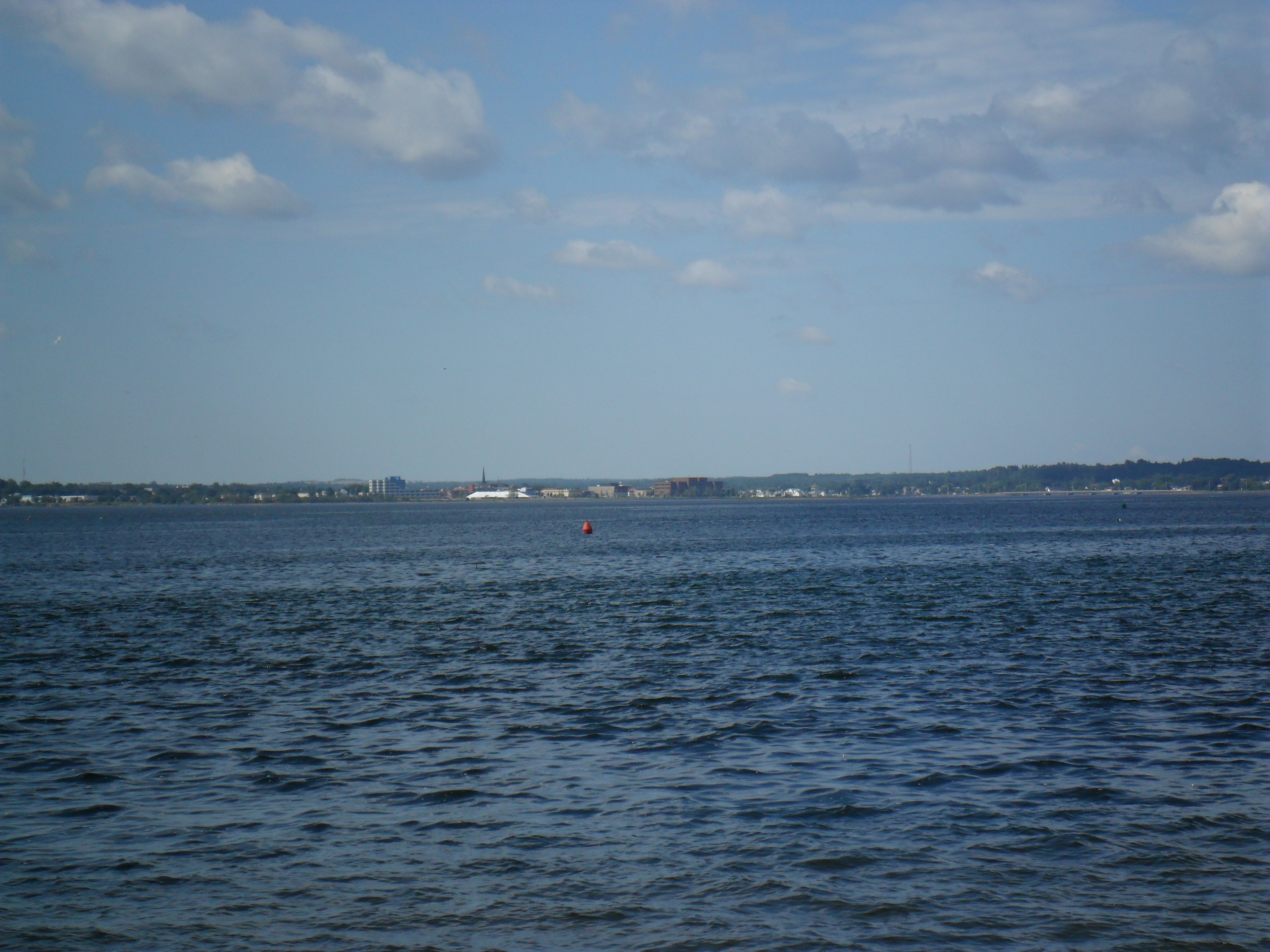 Havre (baie) de Bathurst, avec vue sur la ville